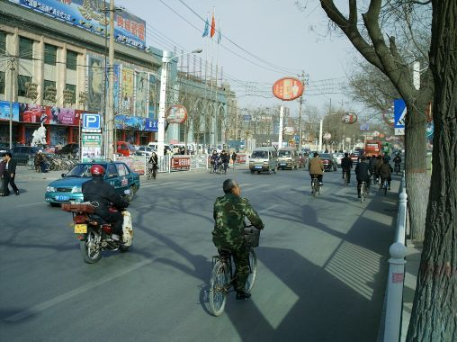 Yuhua Road in Baoding, China